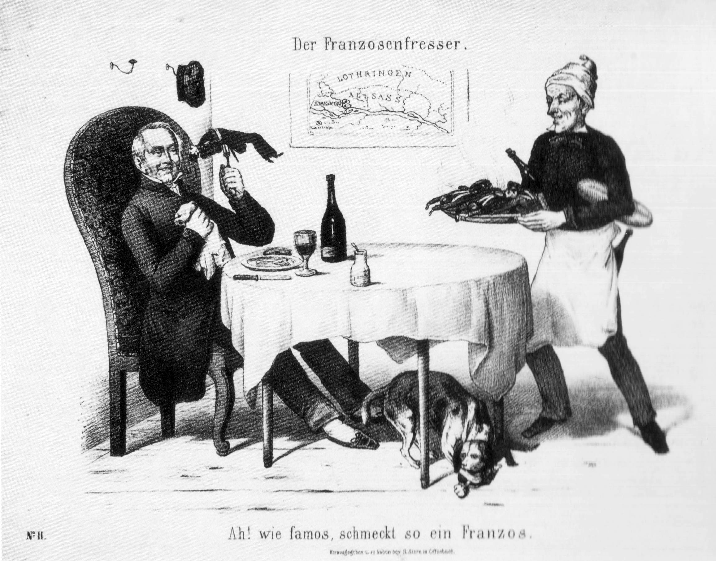 Lithographie, 1848. Der Franzosenfresser. “Ah! wie famos schmeckt so ein Franzos.” (Ernst Moritz Arndt.)